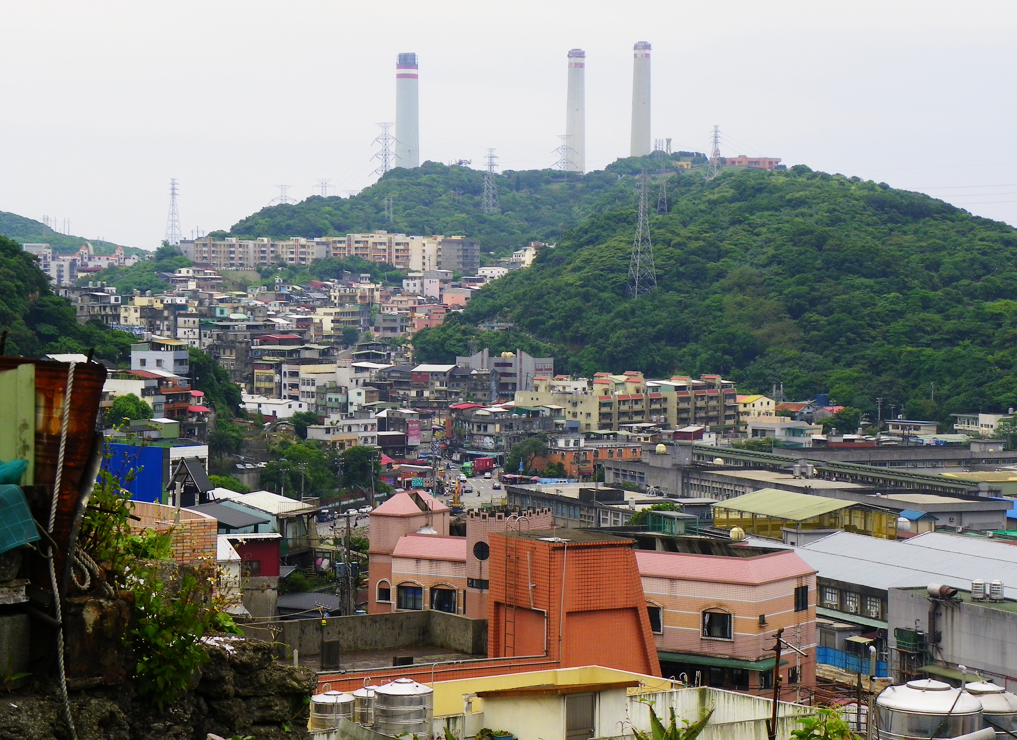 由基隆市中山區健民街遠眺西北火號山，遠方的煙囪是協和發電廠。